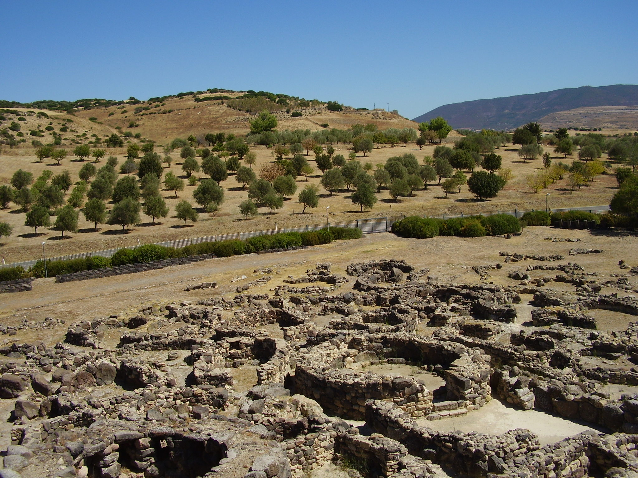 Complesso archeologico Su Nuraxi - MIBAC This is a photo of a monument which is part of cultural heritage of Italy.